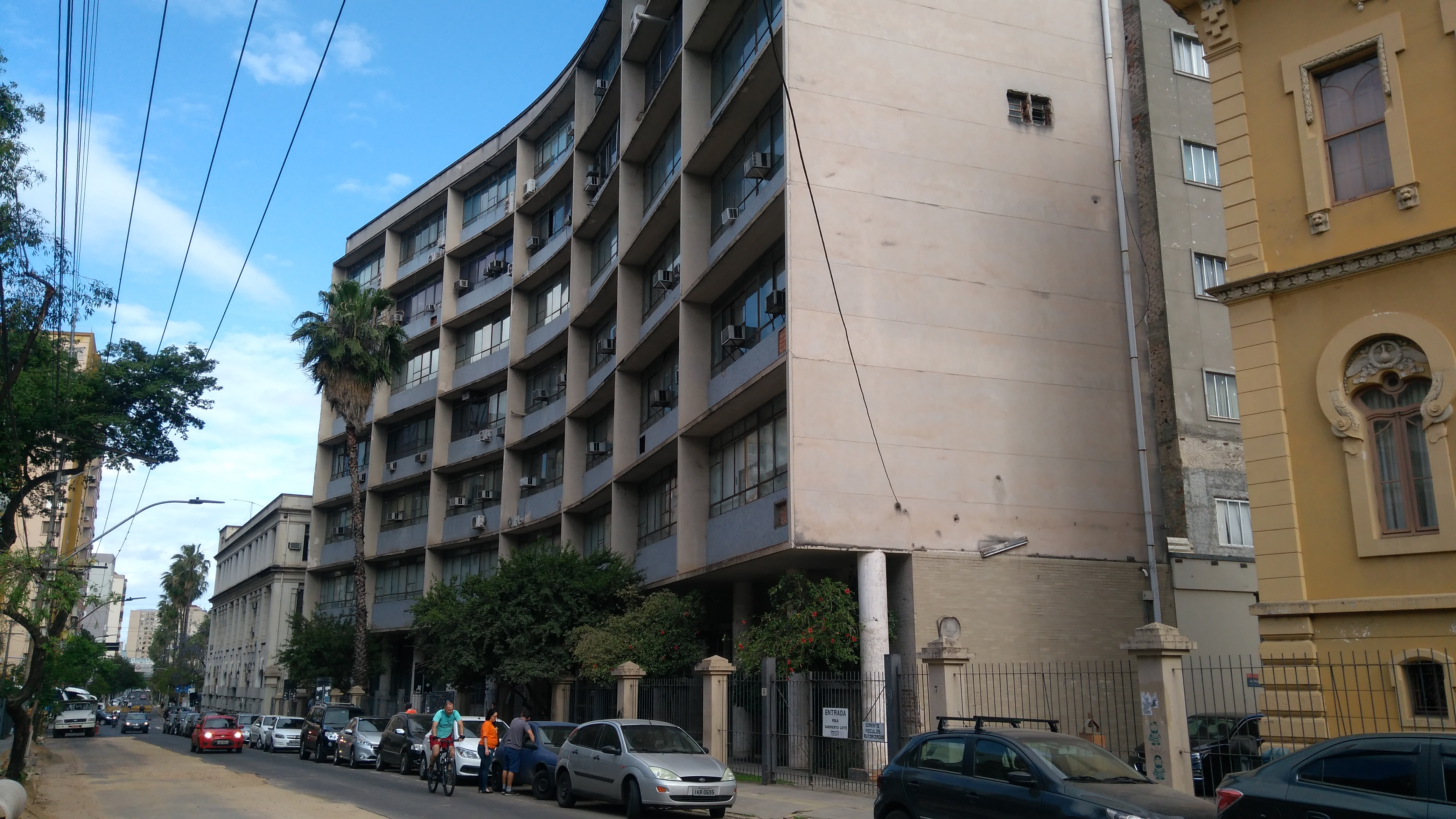 Prédio Engenharia (Nova) (Universidade Federal do Rio Grande do Sul)